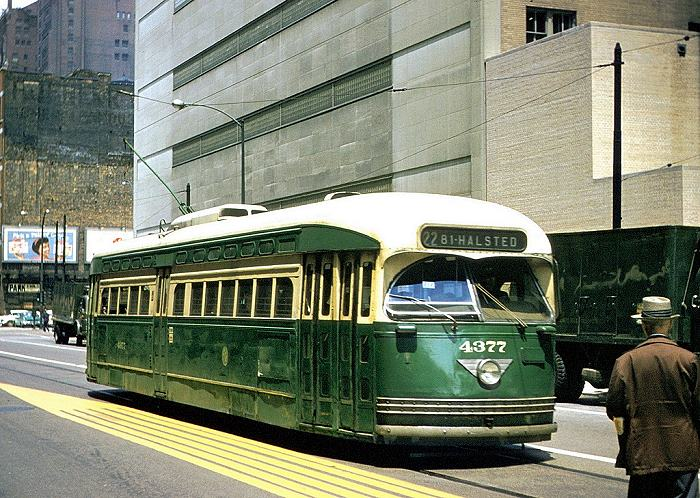 Een scan van een dia die ik Chicago in de jaren 1950 zelf heb gefotografeerd. Contents 1 Summary 2 Licensing 3 Licensing 4 Original upload log Summary PCC Car #4377 (Blue Geese) op Clark & Harrison Street in Chicago, ongeveer 1950 Licensing Categorie:Afbeelding tram